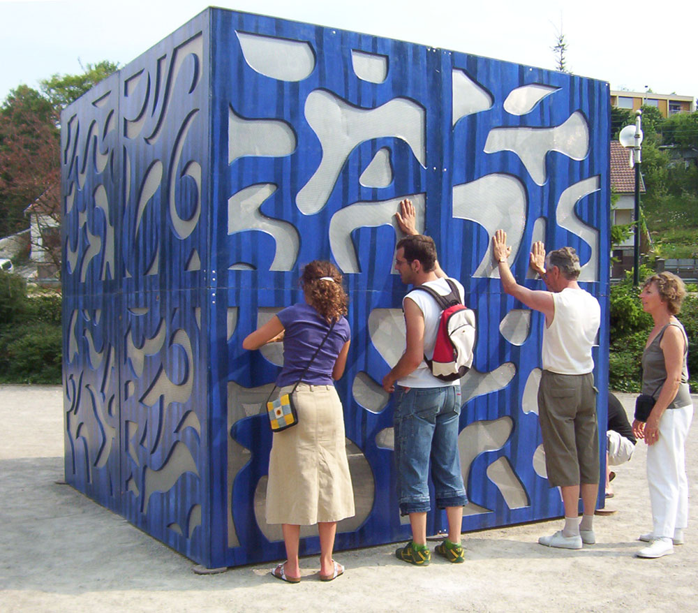 Le Cube, Odyssée Sonore, sculpture musicale tactile de Jean-Robert Sedano et Solveig de Ory.